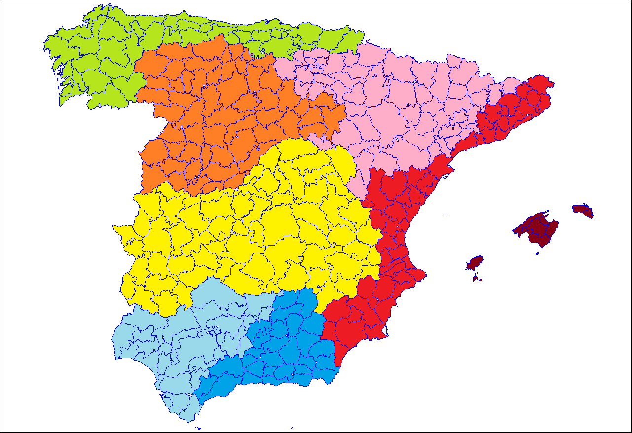 Sobre el mapa de las comarcas de suelo de España (File:Spain comarcas.png) se marcan con distintos colores las grandes unidades geográficas españolas. En verde la Cornisa Cantábrica. En Naranja la Meseta Norte o Cuenca del Duero. En Amarillo la Meseta Sur. En azul claro la Andalucía occidental o bética. En azul oscuro la Andalucía oriental o penibética. en rojo el Levante Español. En rosa el valle del Ebro. En marrón rojizo el archipiélago balear. No aparece en el mapa el archipiélago canario.